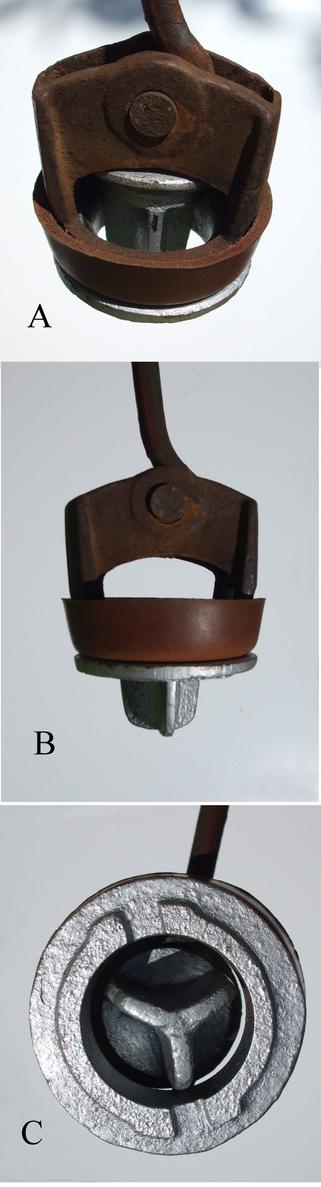 Ventil und Lederdichtung einer alten Hand-Wasserpumpe / SchwengelpumpeLedermanschette/Ventil A geöffnet B geschlossen C Sicht von unten